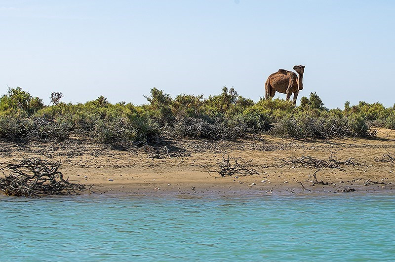 بندر تنگ سیستان و بلوچستان بندر تنگ بخش کوچکی است در شهر چابهار که به دلیل تلاقی کویر و دریا در این منطقه جذابیت های ویژه ای به وجود آمده که جلوه ی بی نظیری را به این روستا بخشیده است. شهرستان کنارک که در جنوب شرقی ایران و در سواحل زیبای دریای عمان قرار گرفته است، از دیرباز با اسکله صیادی بزرگ و فعالش یاد می‌شود. جاذبه های طبیعی بکر و بی نظیری در این بخش کوچک بندری وجود دارد دل هر گردشگری را می برد.سواحل شنی و ماسه ای و صخره ای وجود درخت انجیر معابد و تپه های گل افشان از جاذبه های این بندر بی نظیر است.